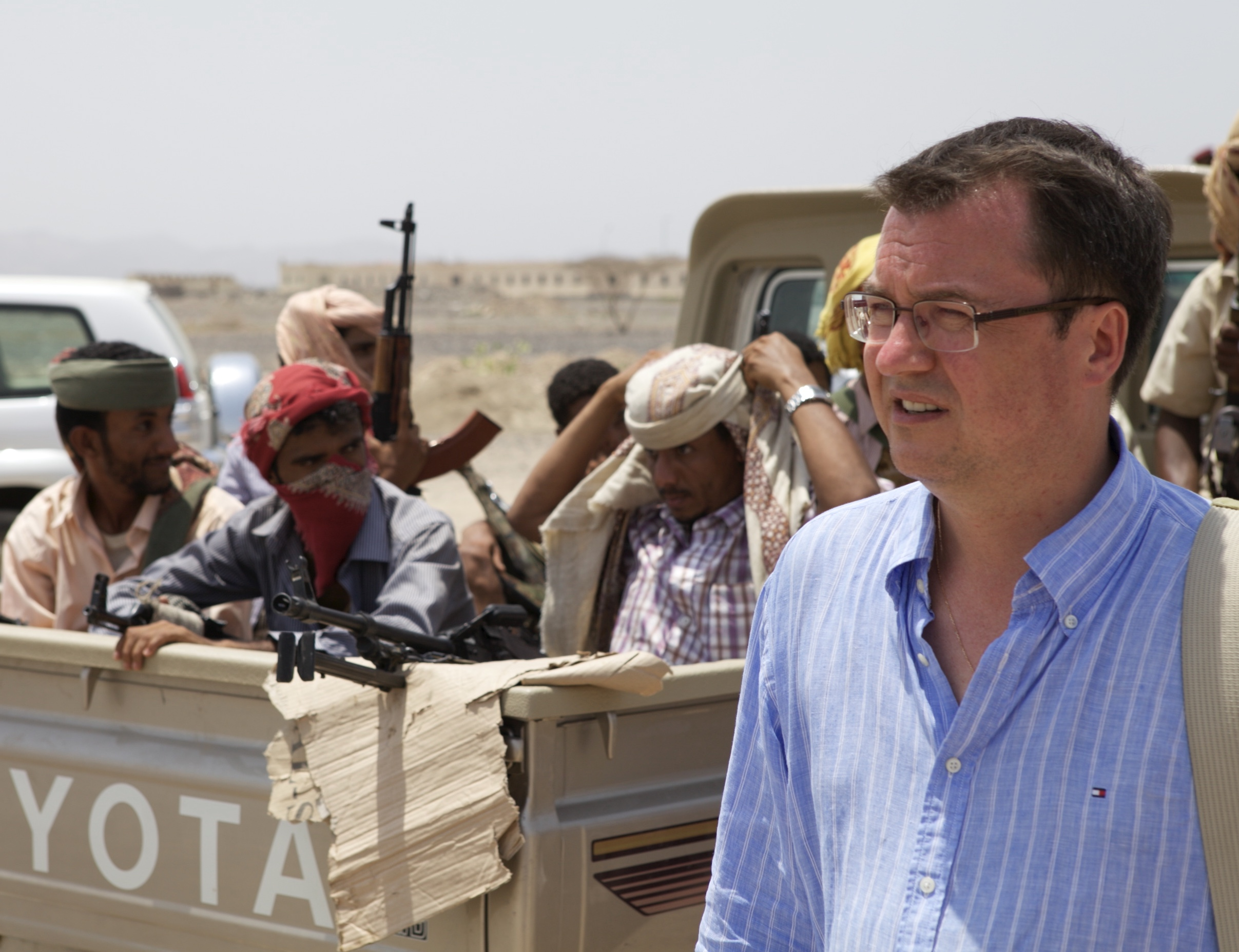 Фото В. П. Фефилова в Южном Йемене, 2012 г., фотограф Антон Васильевич Щербаков